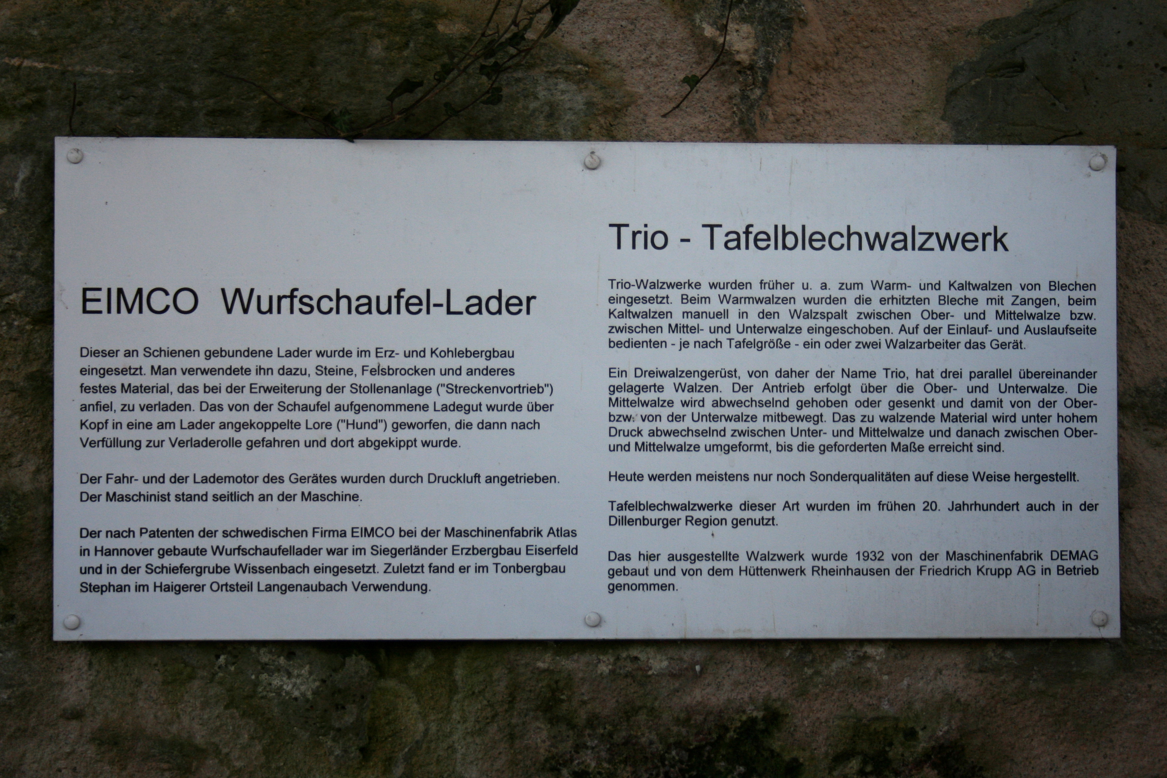 Villa Grün auf dem Schlossberg in Dillenburg